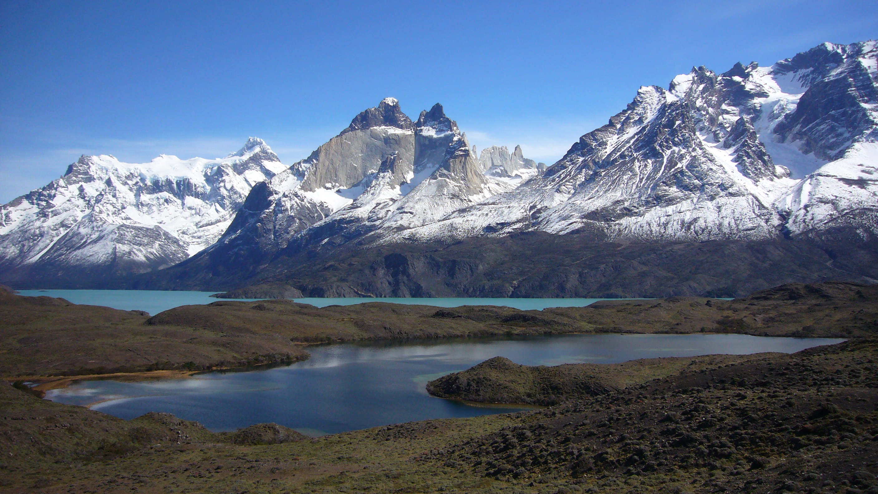 Ost-Ansicht der Bergkette Torres del Paine mit vorgelagerten Seen im Nationalpark Torres del Paine, Süd-Chile im Oktober 2013